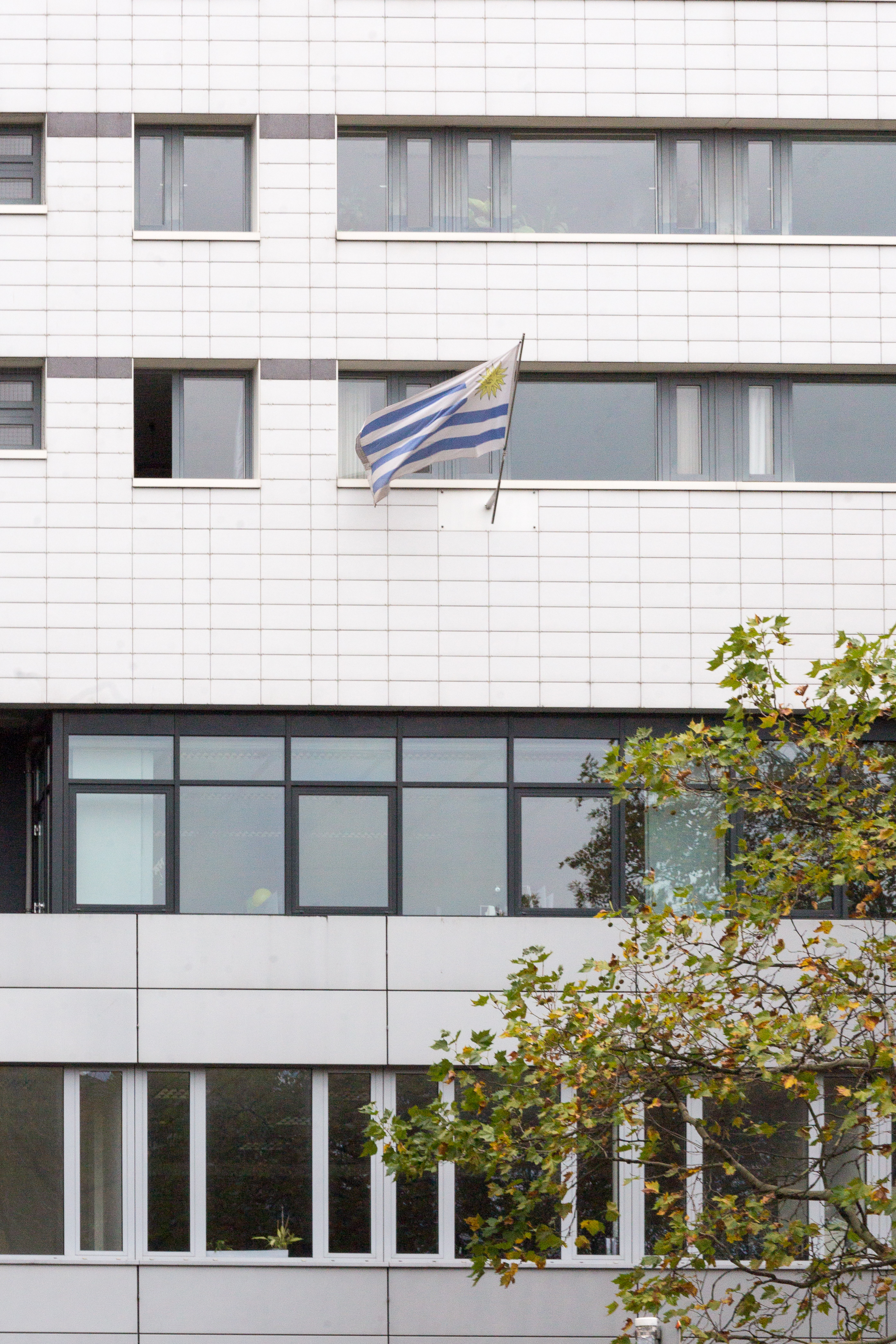 Ambassade d'Uruguay à Berlin, Budapester Straße 39.